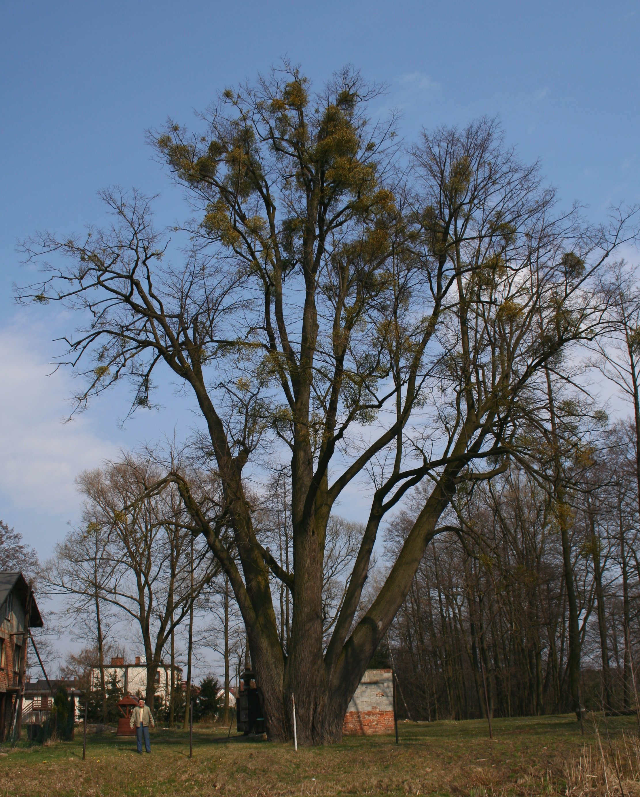 Pomnikowa lipa w Boronowie, powiat lubliniecki, województwo śląskie